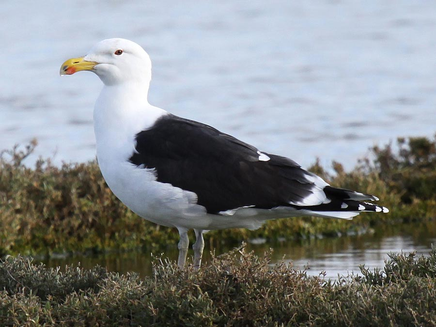 Un goéland brun dans les prés salés des Rouets. Ars-en-Ré (Les Rouets), Île de Ré, Charente Maritime, France.